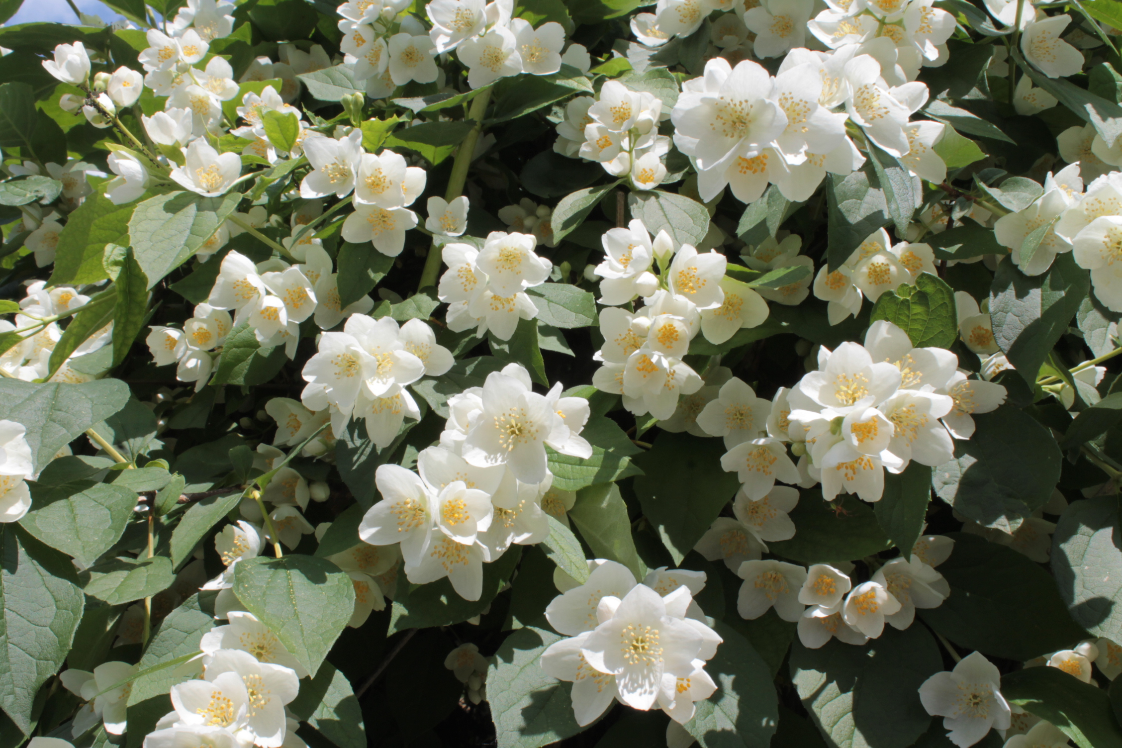 Philadelphus coronarius